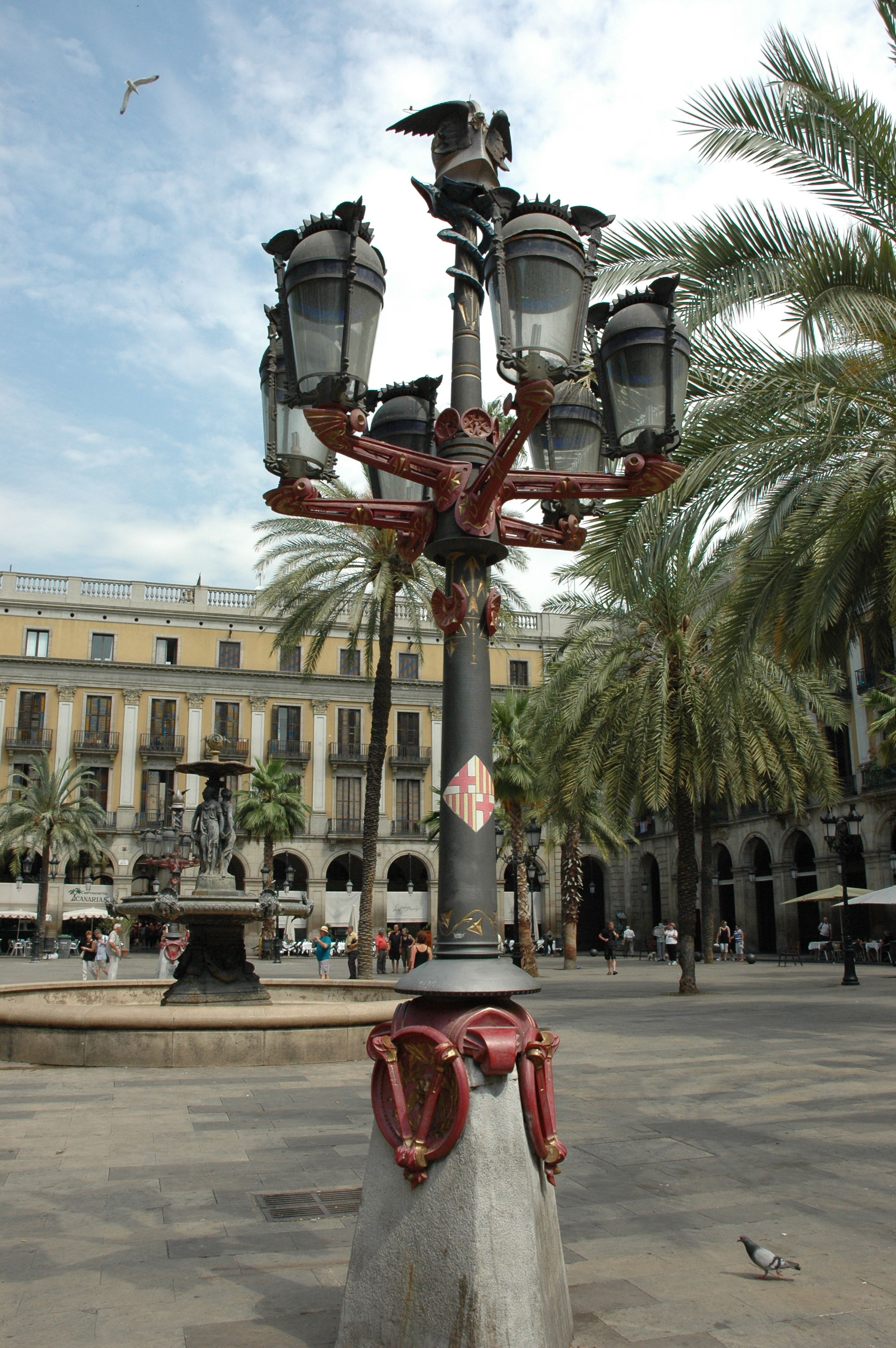 Barcelona - Plaça Reial - Fanal de Gaudí